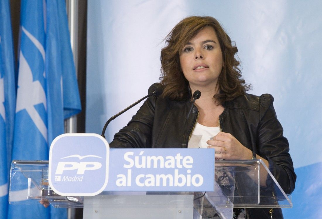 6 nov. Soraya, Pío, Granados y Bartolomé Glez en Alcalá